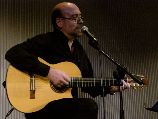 Catalan singer-songwriter Miquel Pujadó performing live in València